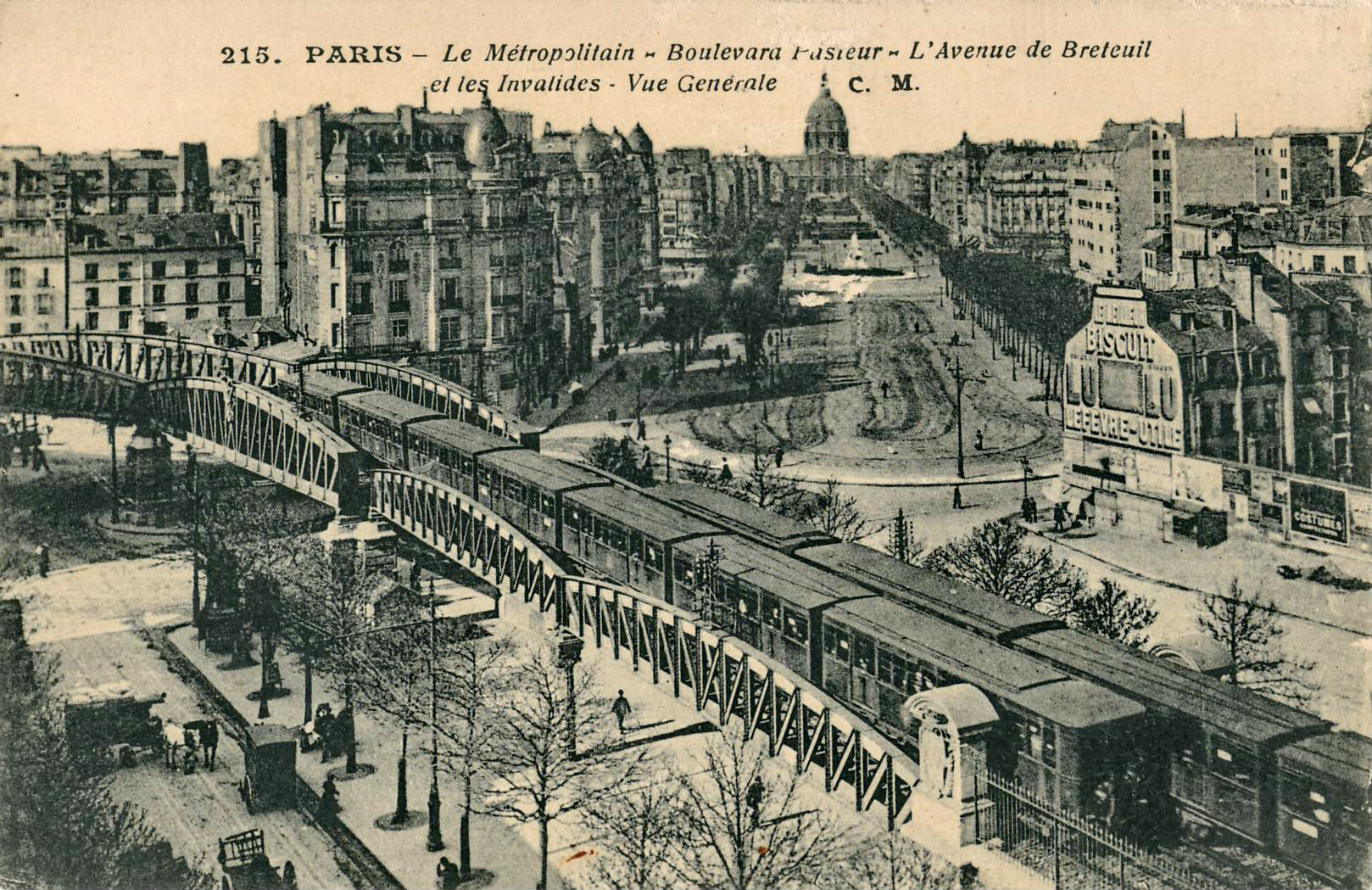 Carte postale ancienne éditée par CM, n° 215 : Le Métropolitain - Boulevard Pasteur - Avenue de Breteuil et les Invalides - Vue générale